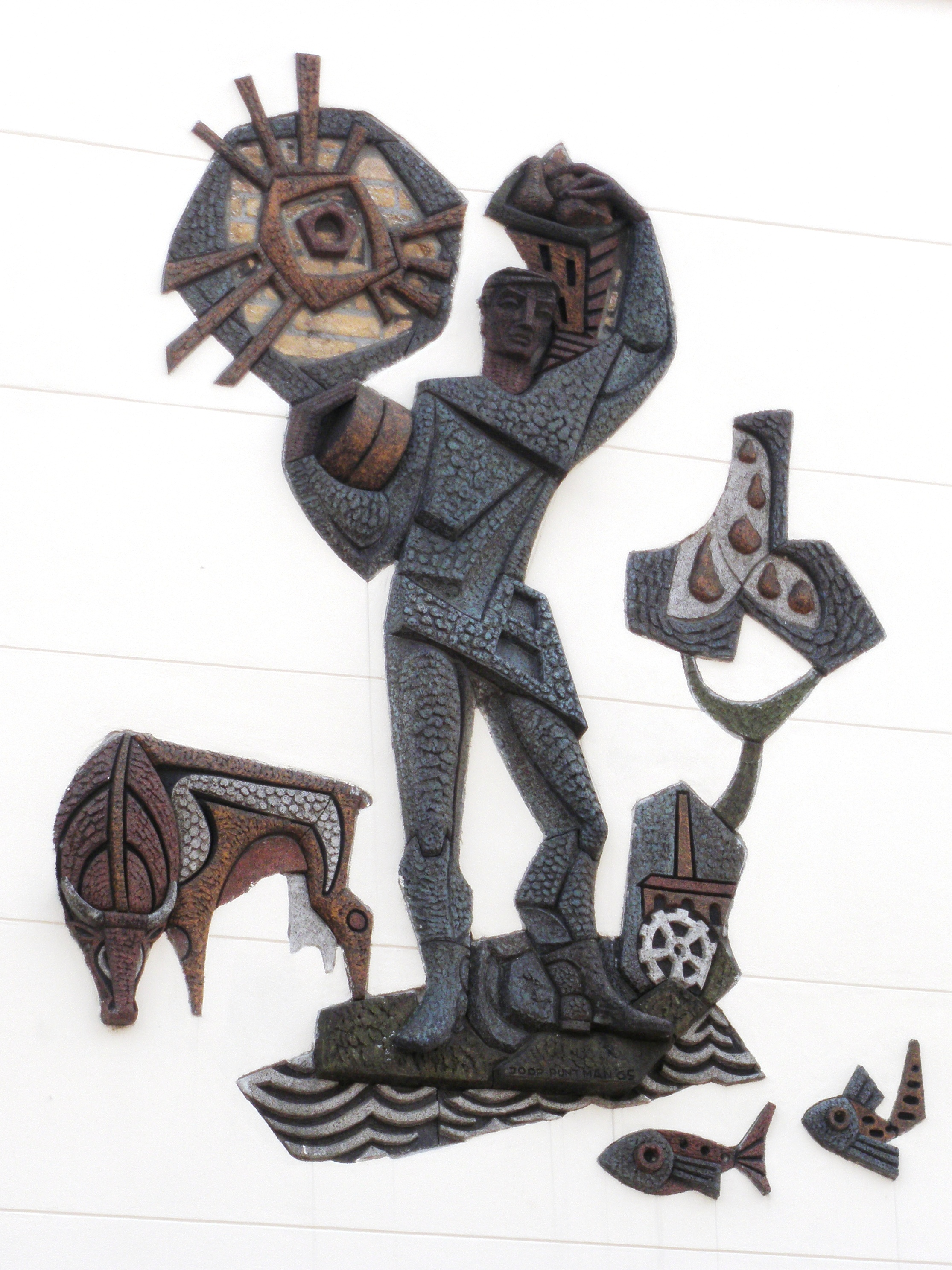 Gevelrelief aan de Hoogstraat in Montfoort.